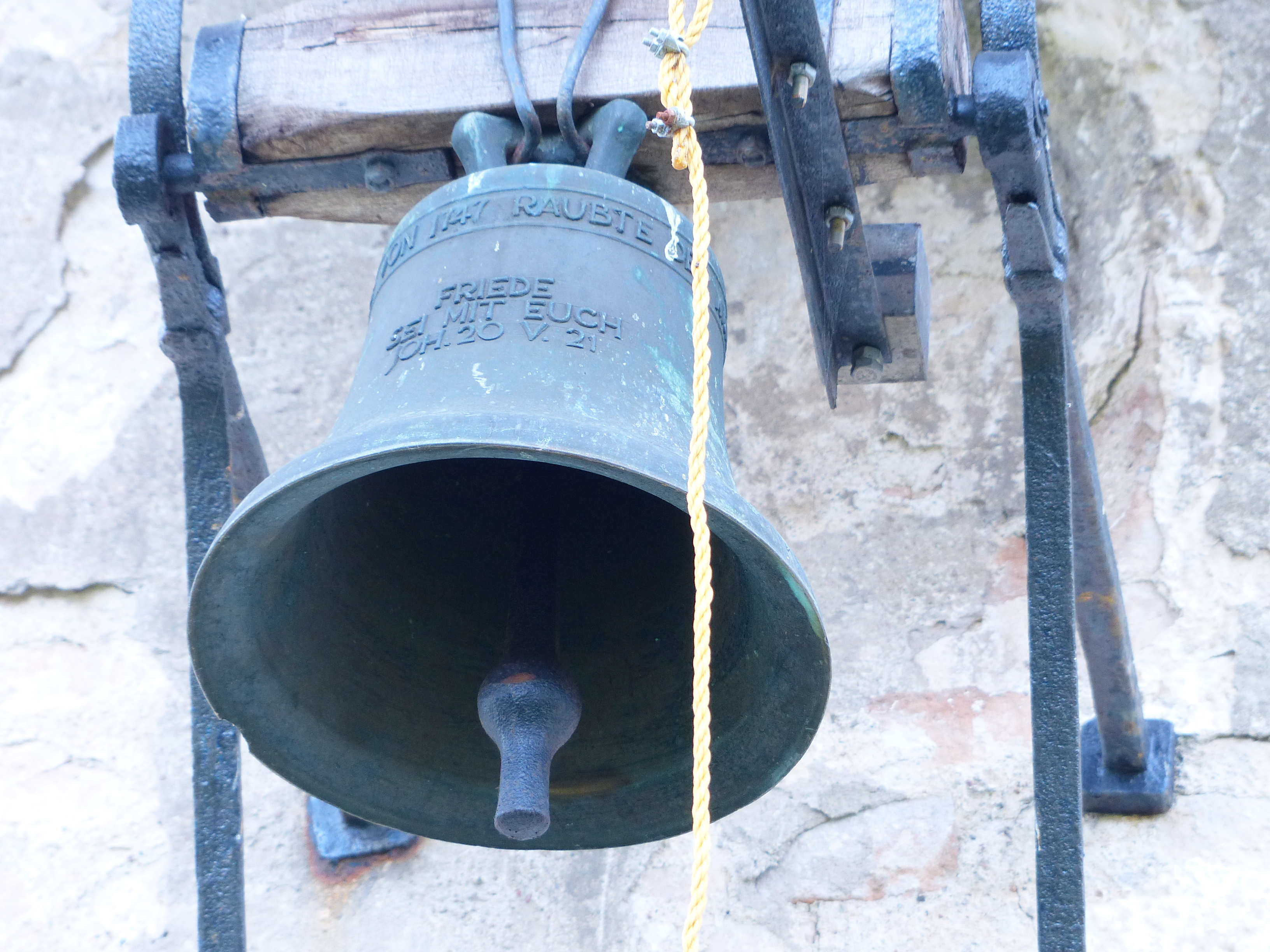 Gellendin bei Anklam, Kapelle, Geläut